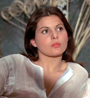 Simonetta Stefanelli, screenshot from the film In nome del popolo italiano